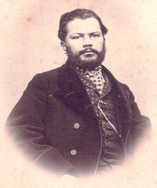 Retrato de José Joaquín Aguirre Campos. médico cirujano y político liberal chileno. Nació en Santa Rosa de Los Andes a fines de noviembre de 1822. Murió en Cartagena, Chile, el 22 de enero de 1901